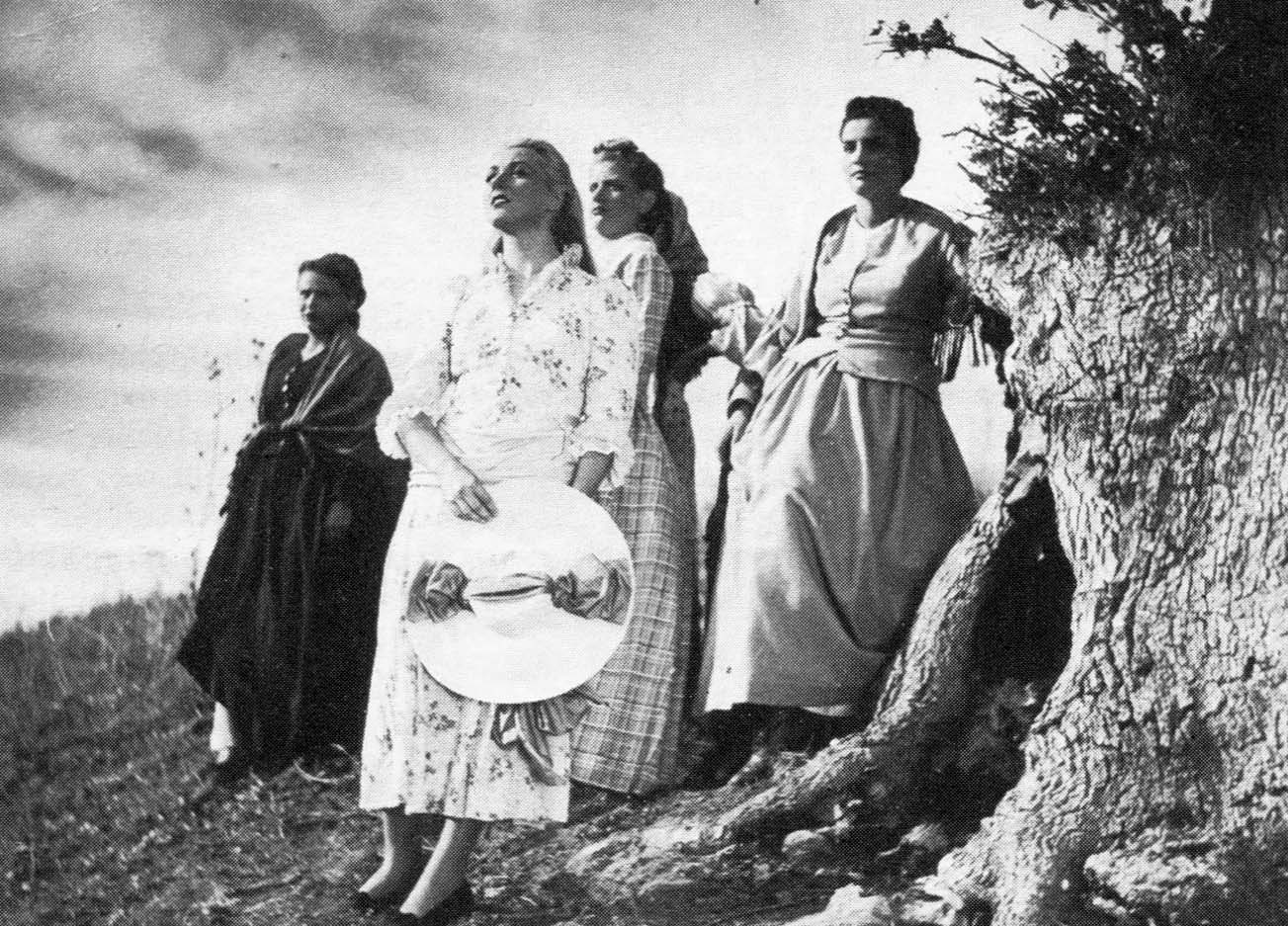 Terra di nessuno (baffico , 1939) - foto di scena con Nelly Corradi